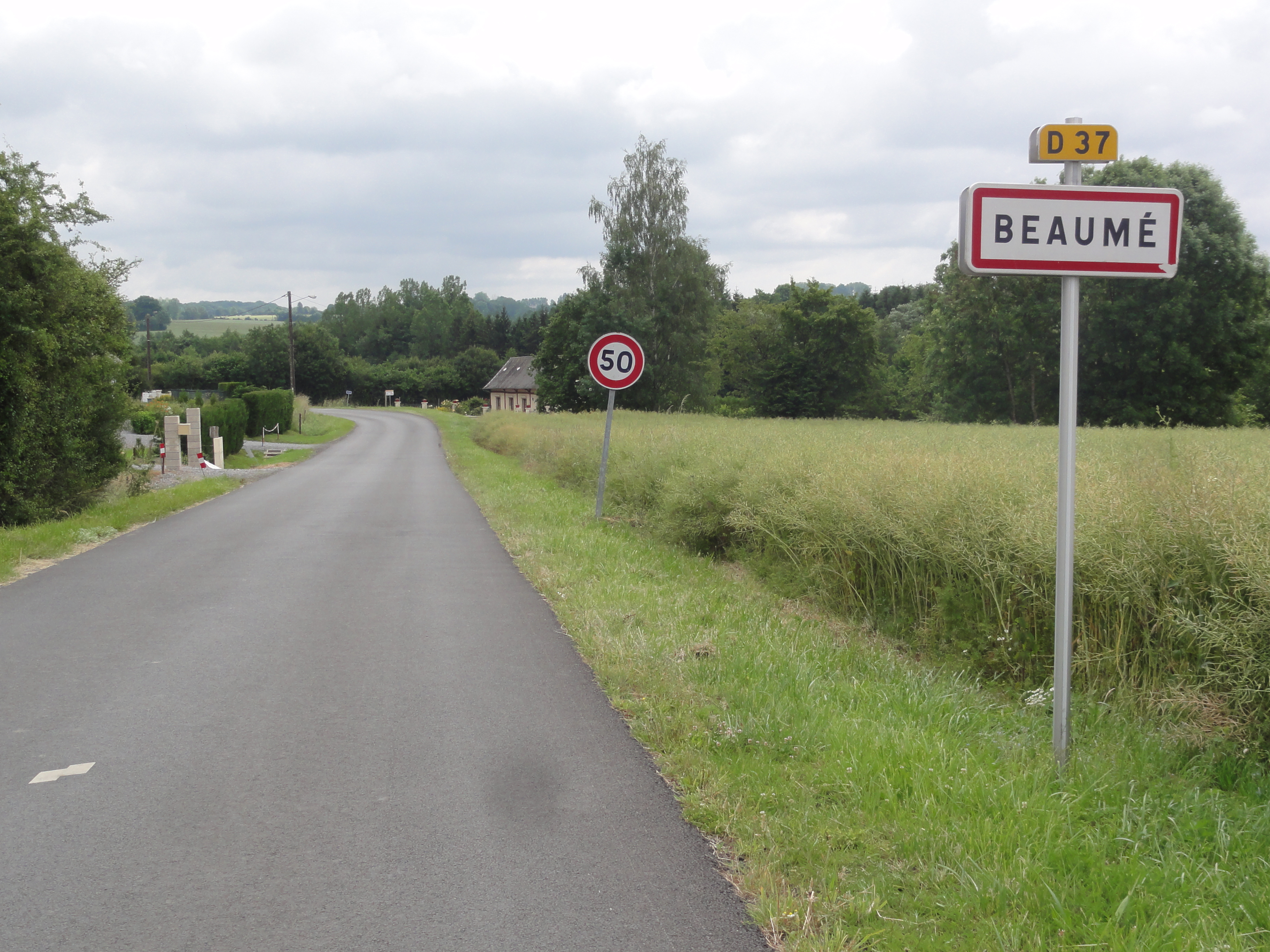 Beaumé (Aisne) city limit sign